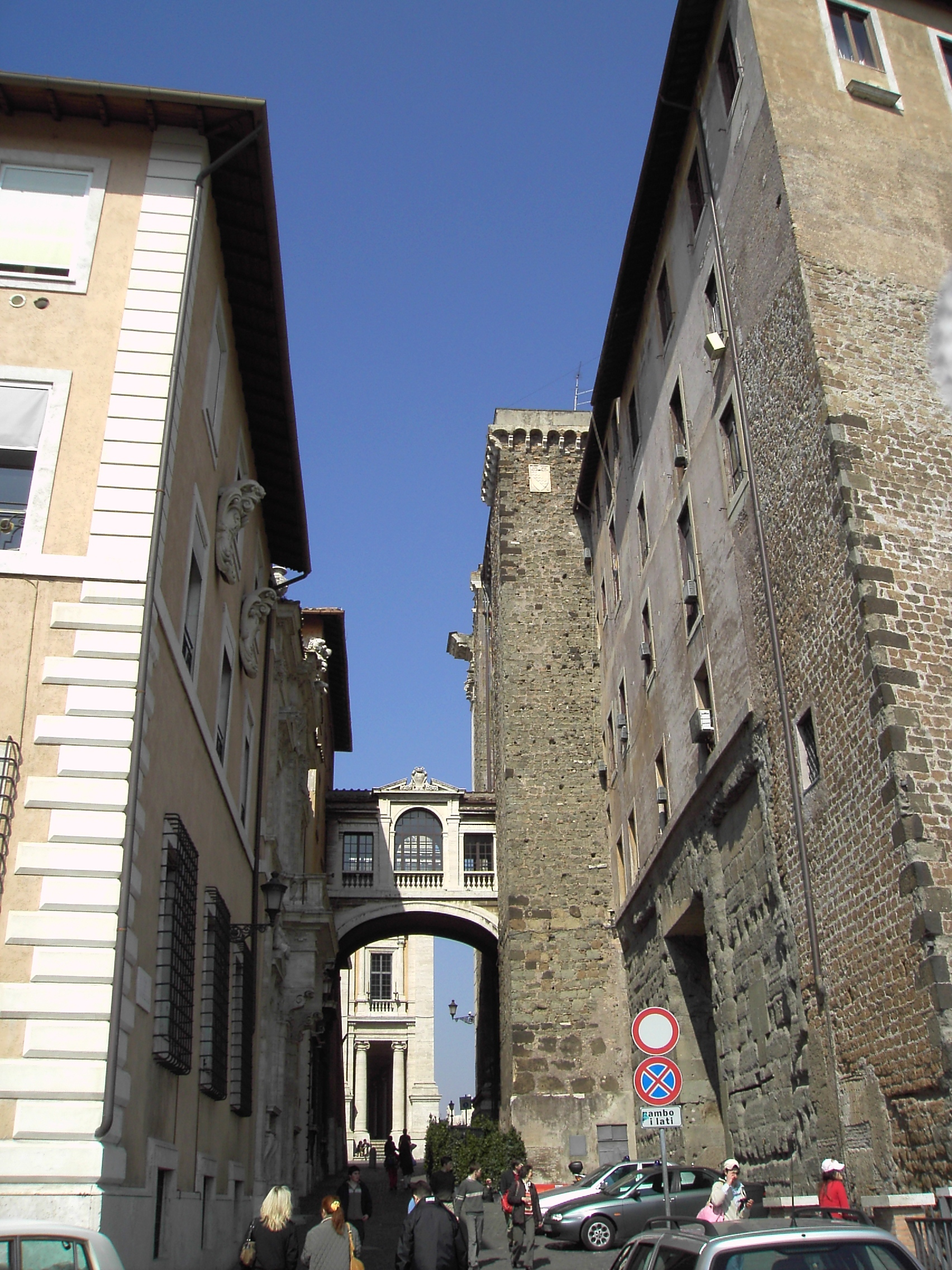 Roma, via del Campidoglio e torre di Bonifacio IX